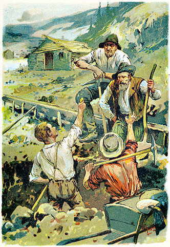 Illustration in Die Goldsucher am Klondyke. Aus den Erlebnissen eines jungen Deutschen. Für die reifere Jugend erzählt von E. von Barfus. Zweite Auflage. Stuttgart, Verlag von Gustav Weise. (1904). Die erste Auflage ist 1899 erschienen.